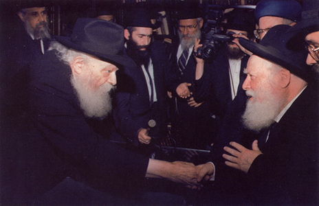 הרבי מחבד עם הרב אברהם שפירא והרב מרדכי אליהו בעת ביקורם אצלו, י"א אייר תשמ"ט